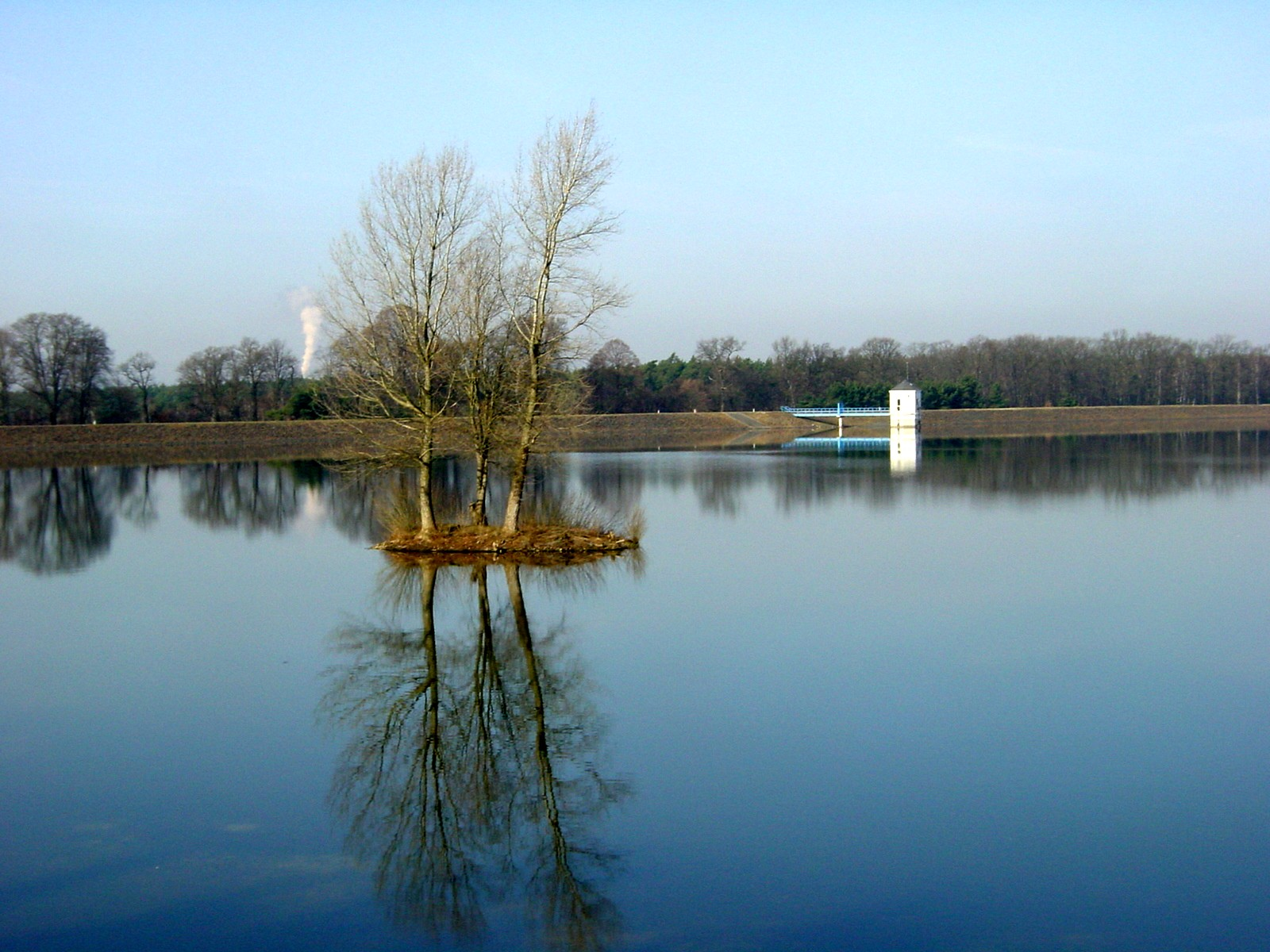 Stausee Radeburg II (Großer Teich Radeburg)